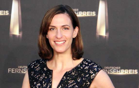 Ulrike Frank beim Deutschen Fernsehpreis 2012